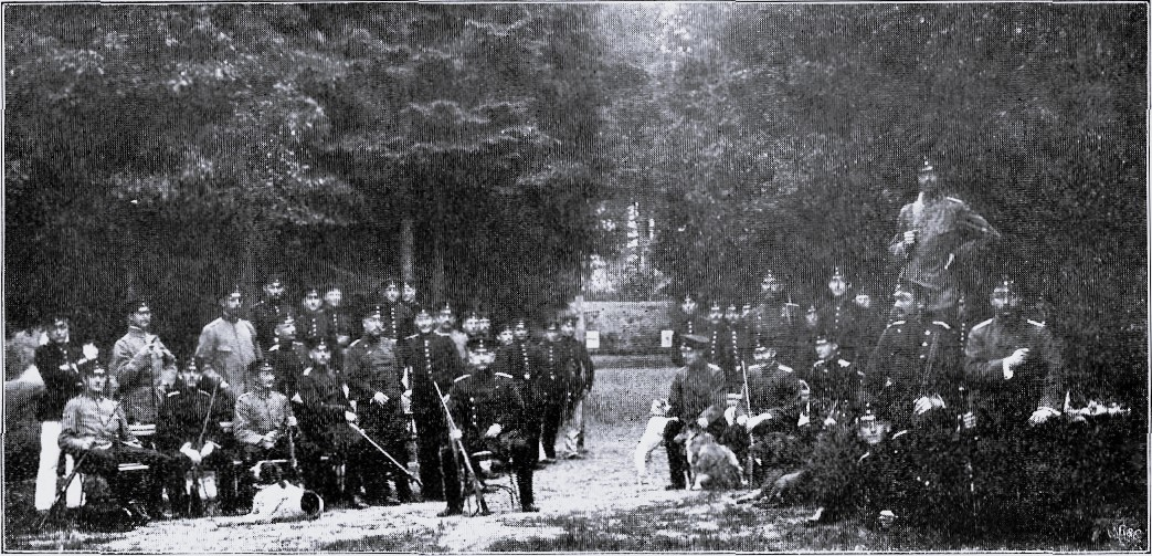 Offizierschiessstand